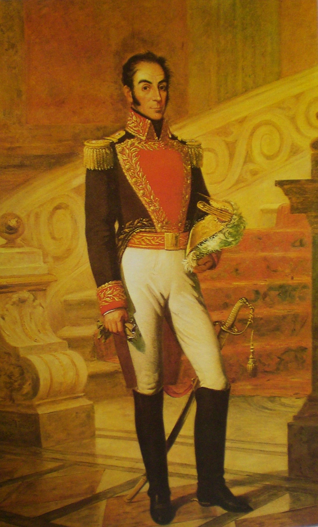 Portrait of Simón Bolívar